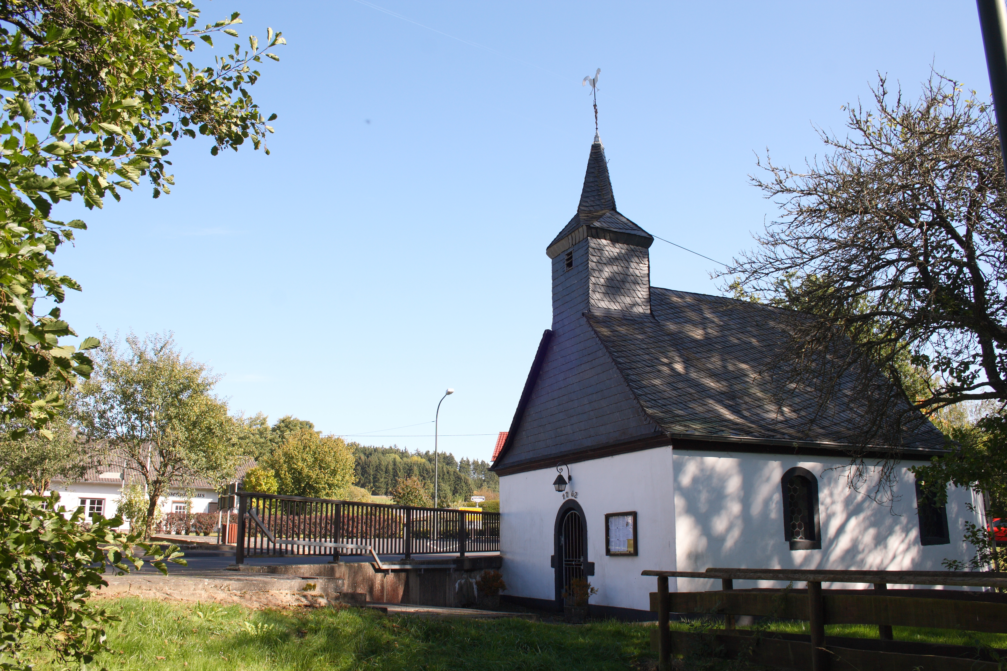 Katholische Filialkirche in Hörschhausen im Landkreis Vulkaneifel (Rheinland-Pfalz)